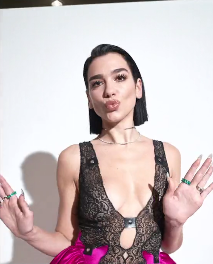 Dua Lipa in a photoshoot for the 2019 Brit Awards